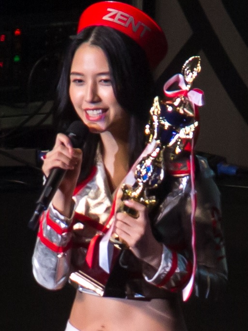 日本レースクイーン大賞2018 チャナナ沙梨奈